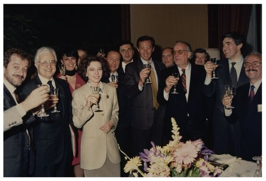 Votazioni per l'elezione del Presidente della Camera dei Deputati - Proclamazione e congratulazioni al nuovo Presidente della Camera dei Deputati Irene Pivetti